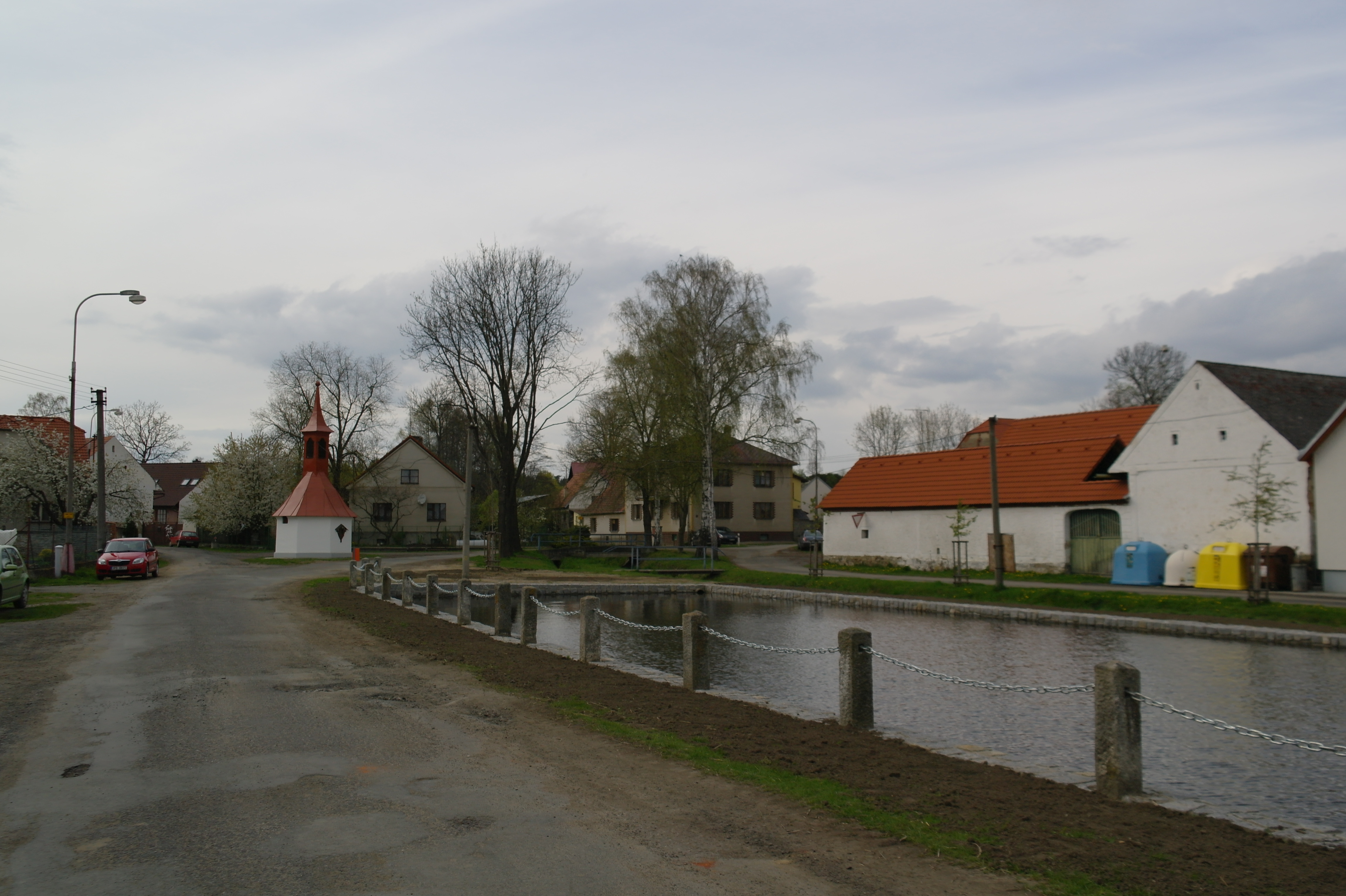 Horažďovická Lhota, náves s rybníkem a kaplí